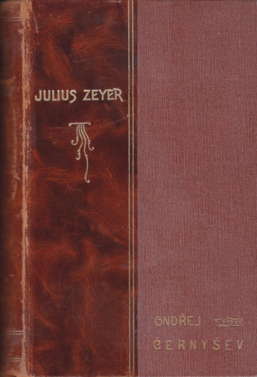 Ondřej Černyšev, vydání z roku 1902